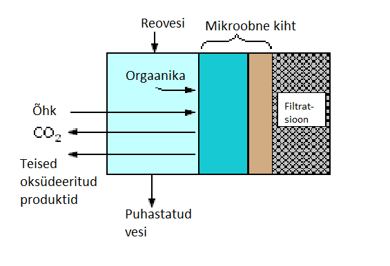 Biokile ehitus